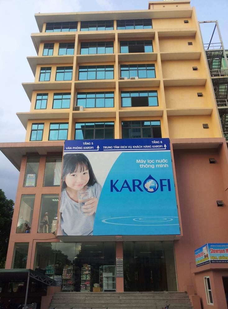 Tòa nhà KAROFI, Lô CC1.I.3.1, KĐT Pháp Vân, Tứ Hiệp, Hoàng Liệt, Hoàng Mai, Hà Nội